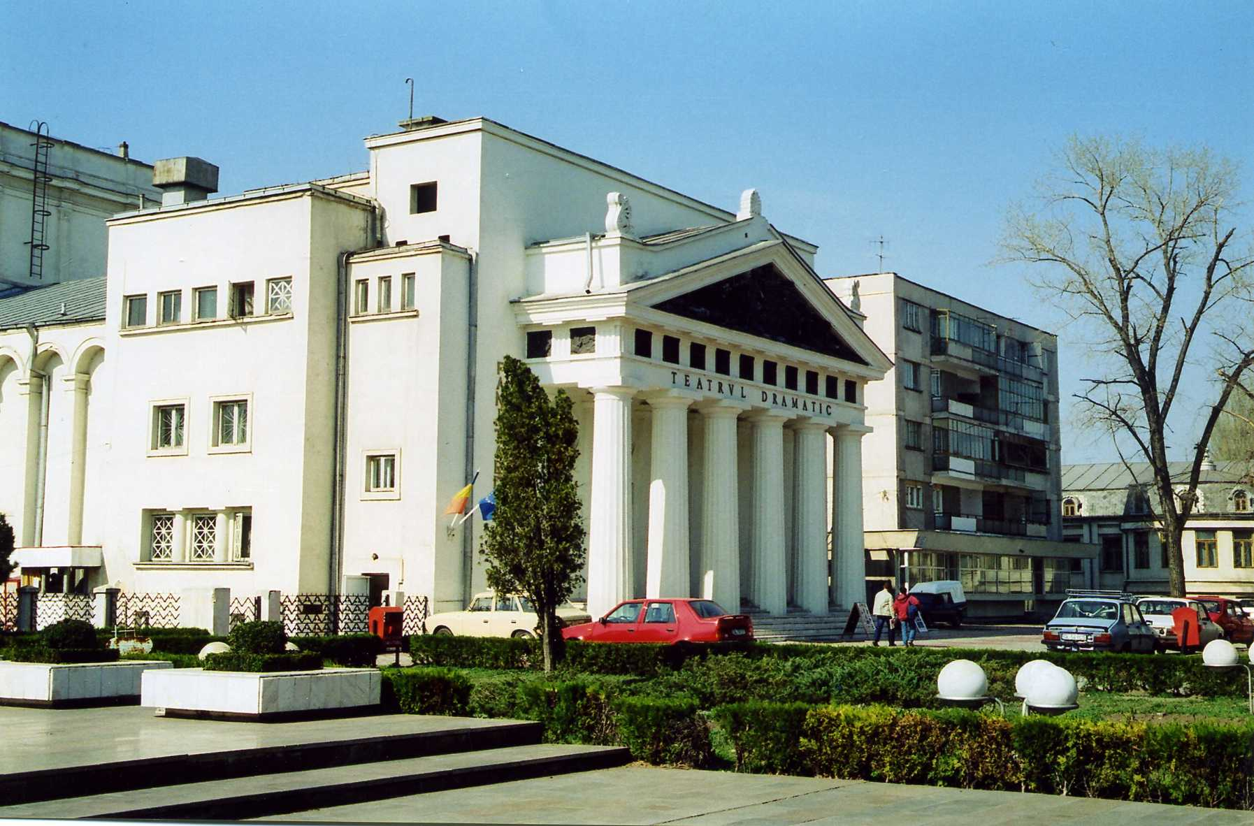 Teatrul Dramatic Fani Tardini in Galaţi